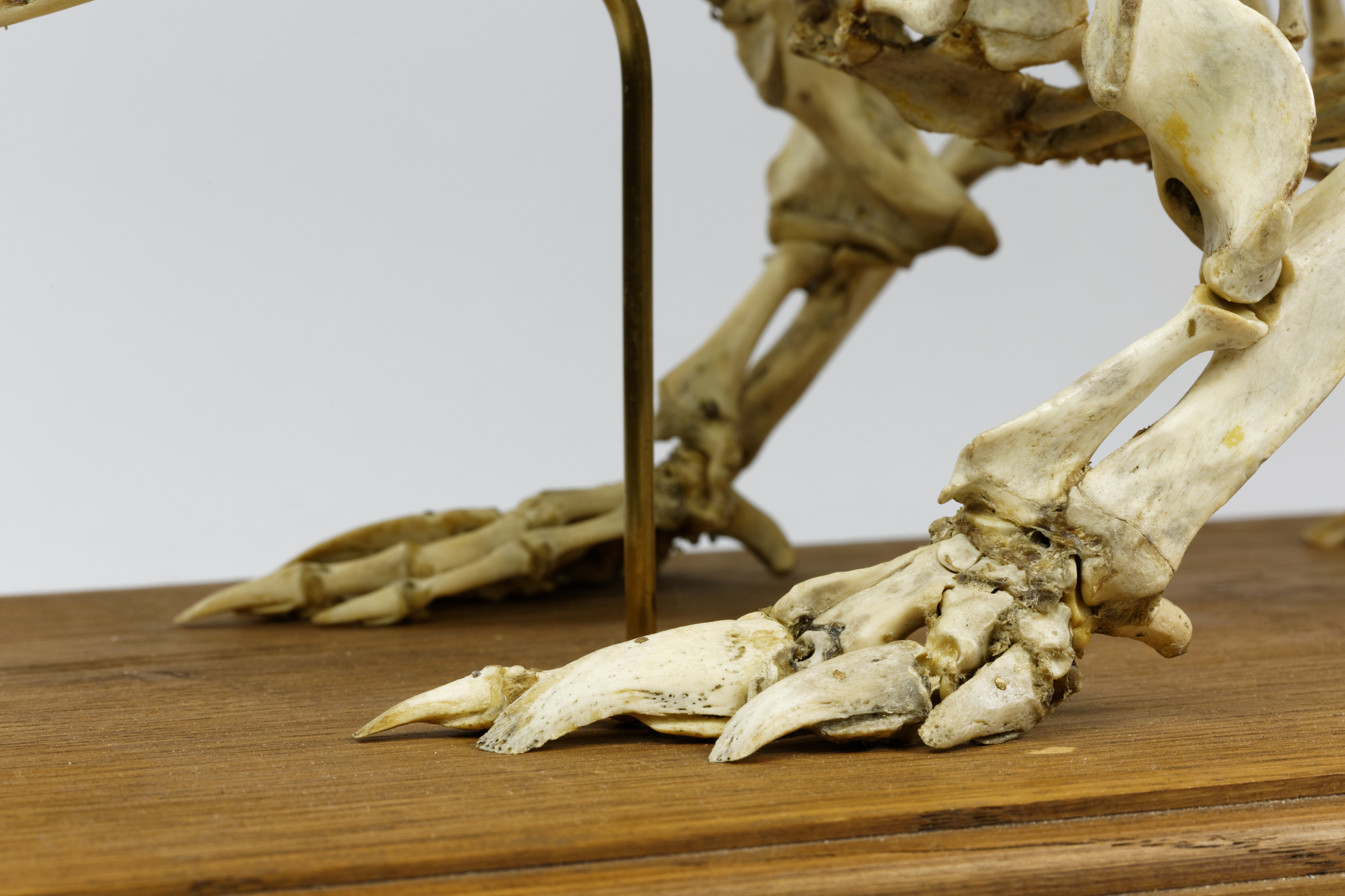 Un tatou à neuf bandes - Dasypus novemcinctus - de la collection de l'Université Pierre-et-Marie-Curie à Paris.